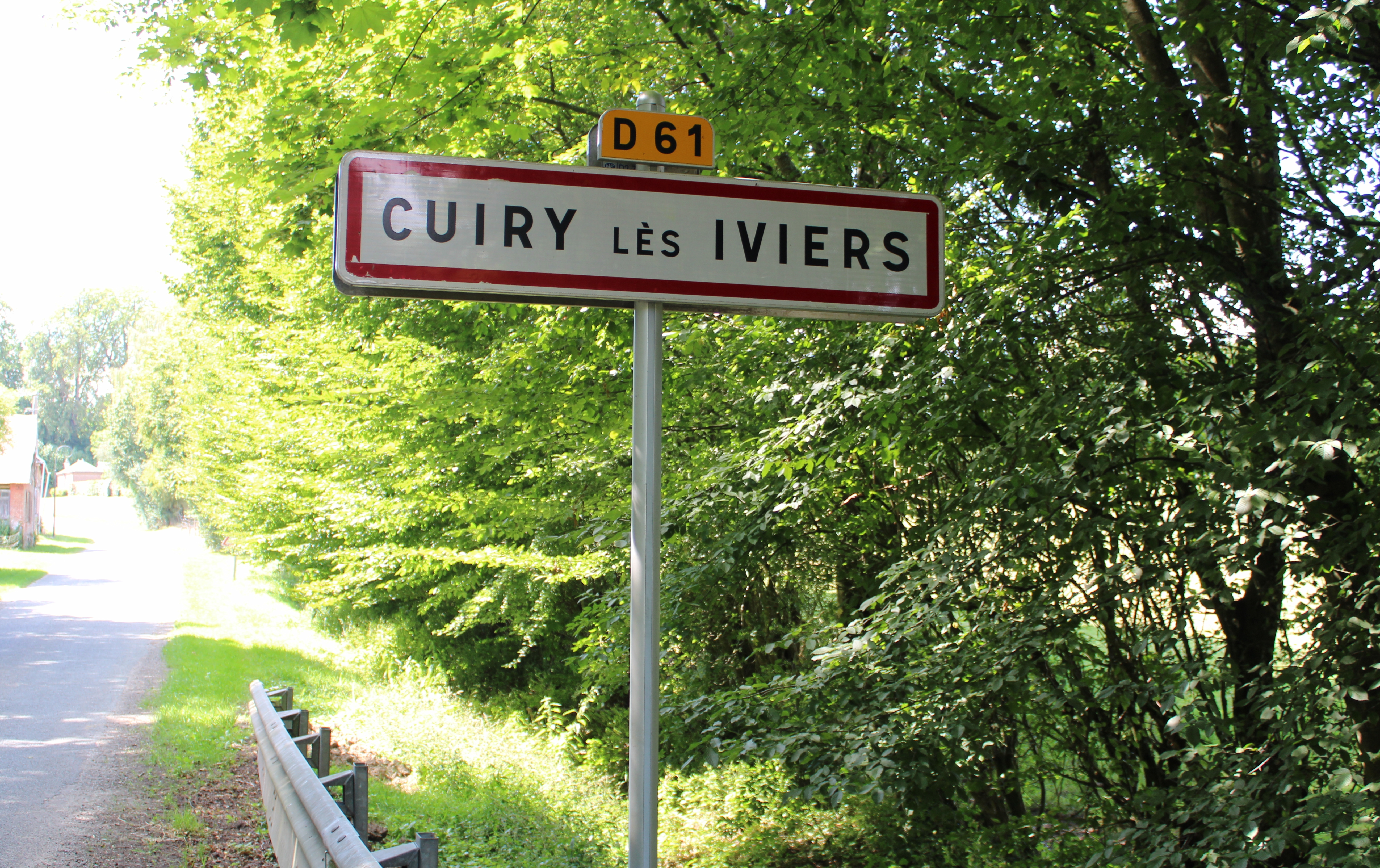 Entrée du village